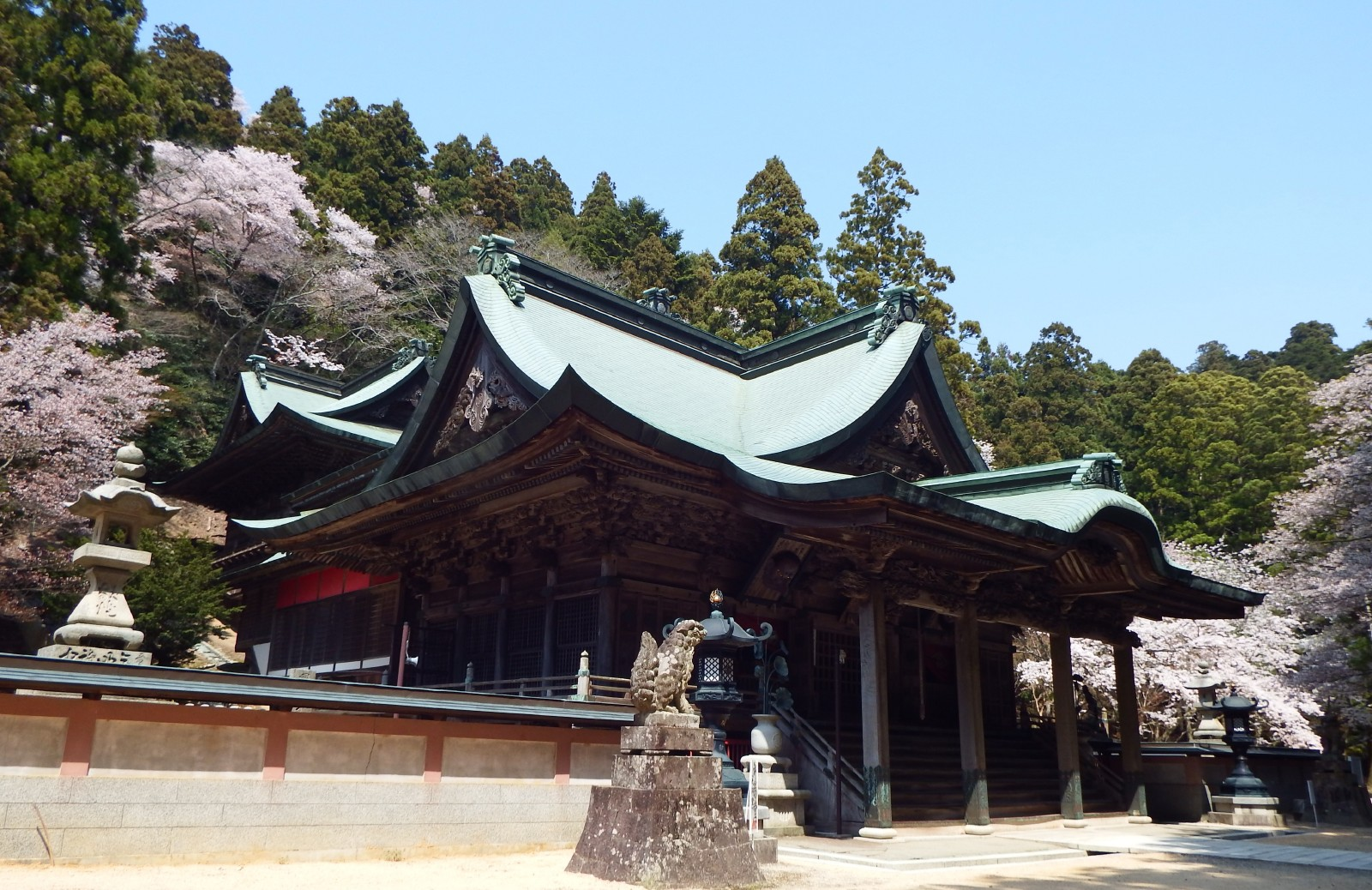 箸蔵寺の本殿